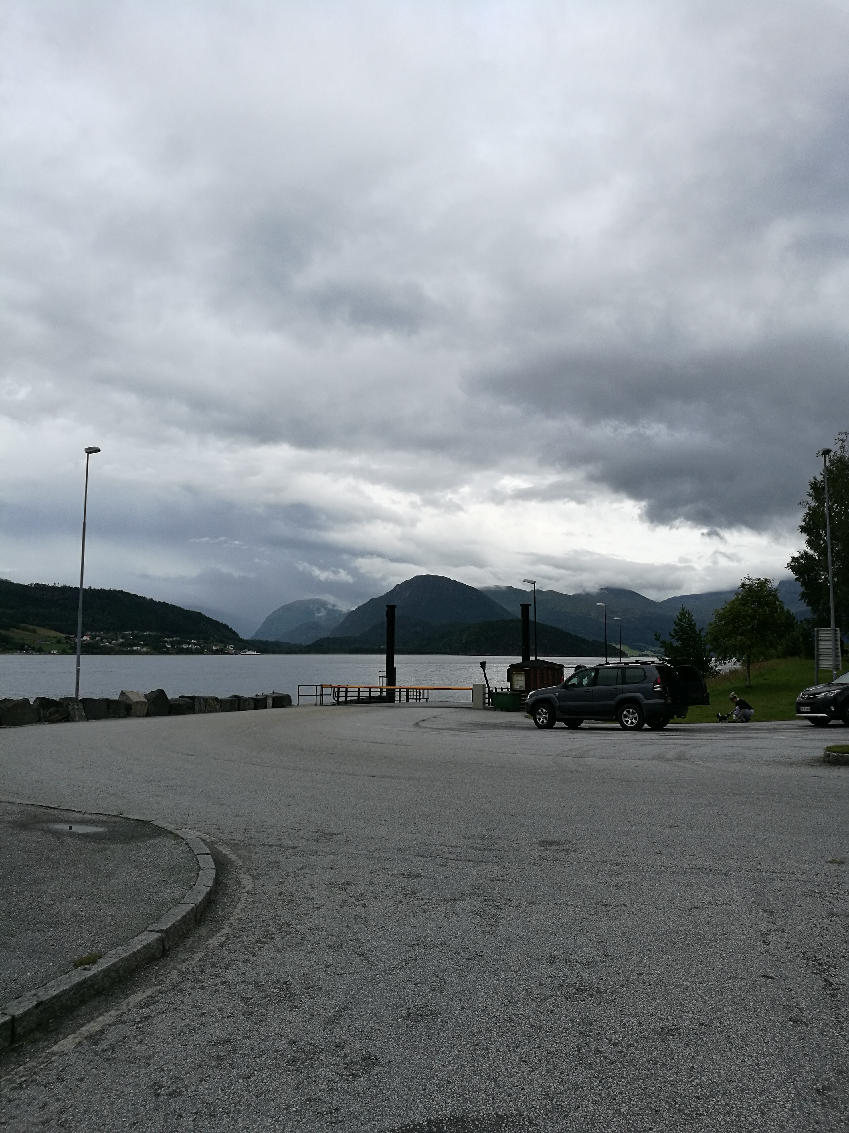 Rykkjem ferjekai i Sunndal kommune på sambandet Kvanne–Rykkjem over Stangvikfjorden på Fylkesveg 670.